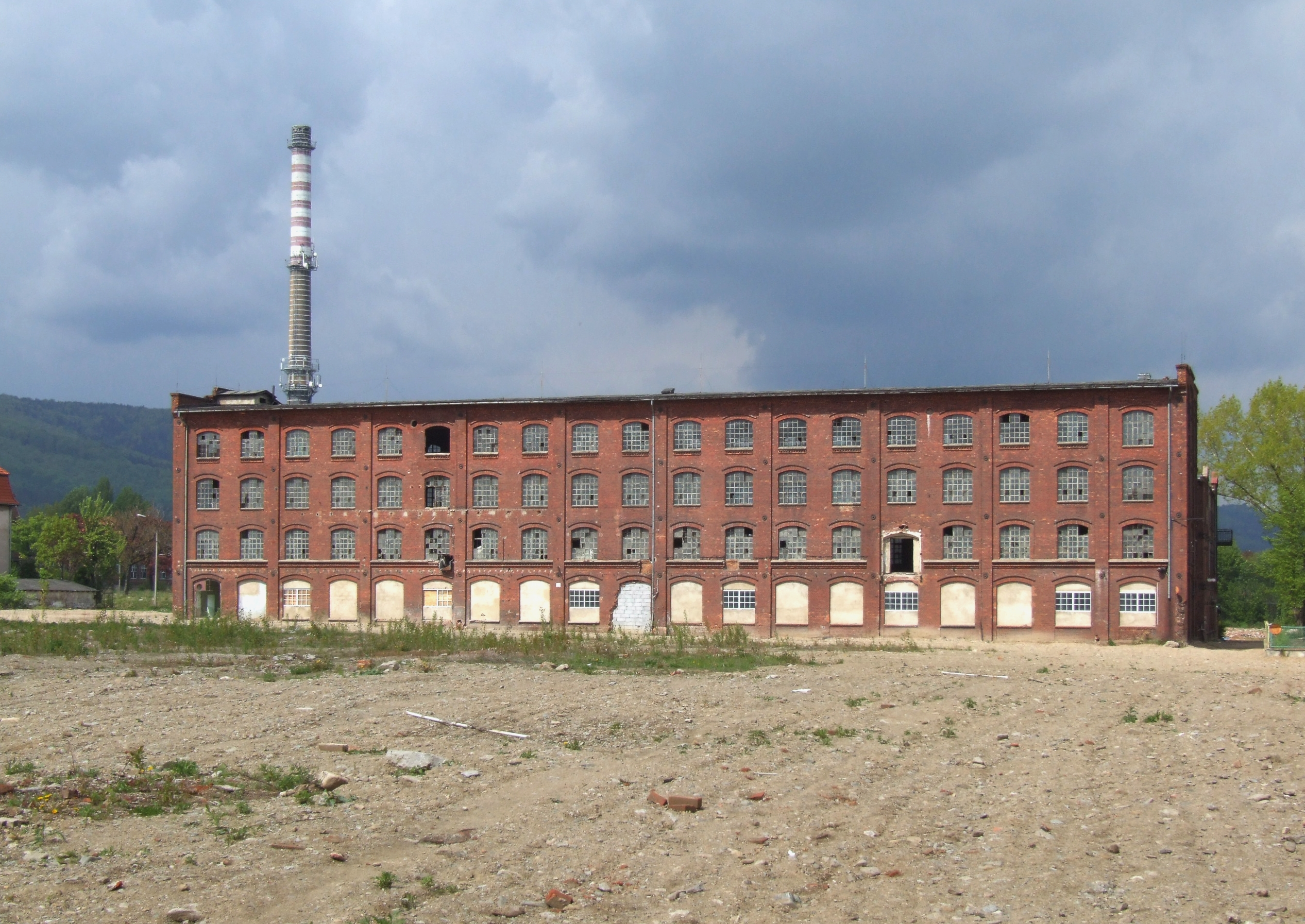 Zabudowania dawnej fabryki Christian Dierig AG w Bielawie (Langenbielau)